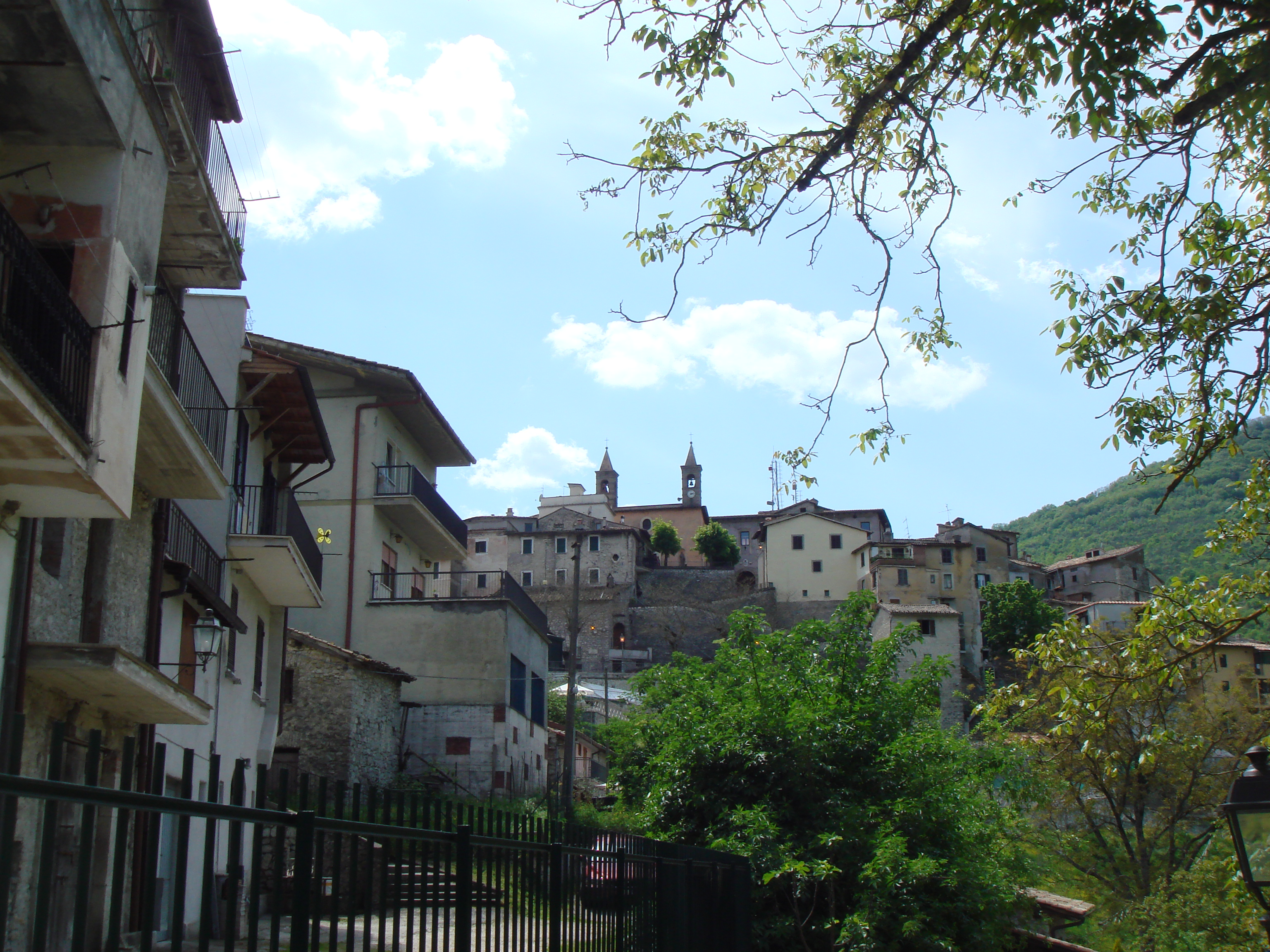 Panorama de Percile, Lazio, Italia